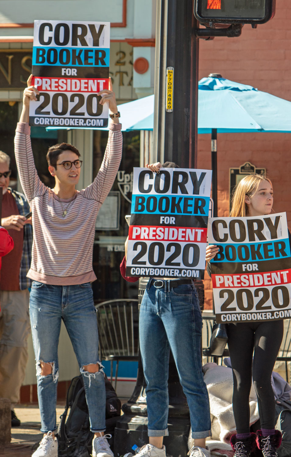 Booker